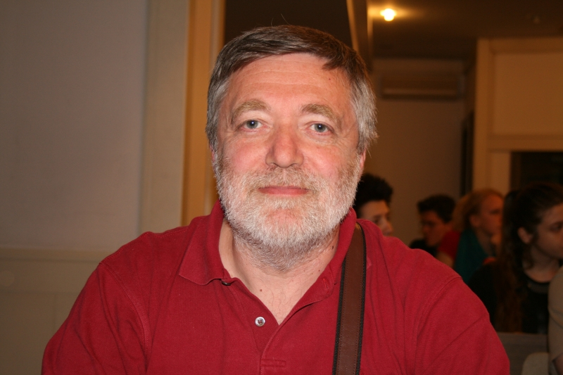 Hrvoje Prćić na SFeraKonu u Zagrebu